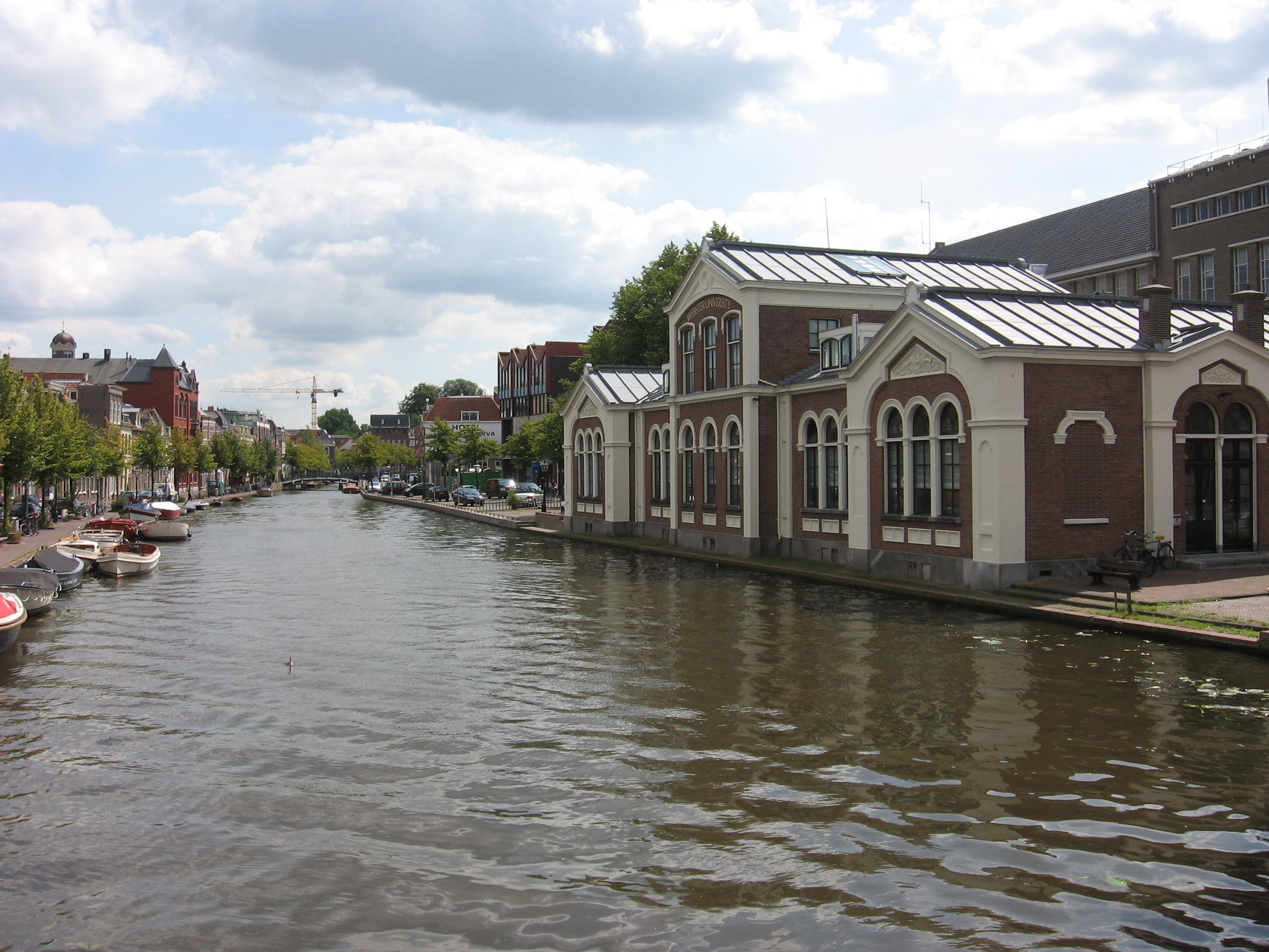 Boommarkt 1 Webster University aan de Oude Rijn, Leiden. Rijksmonument